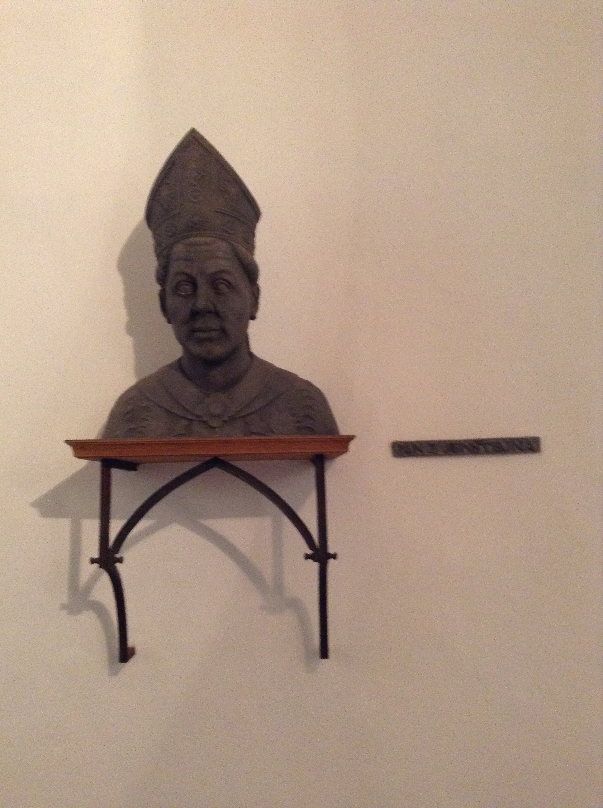 Busta Jana z Jenštejna